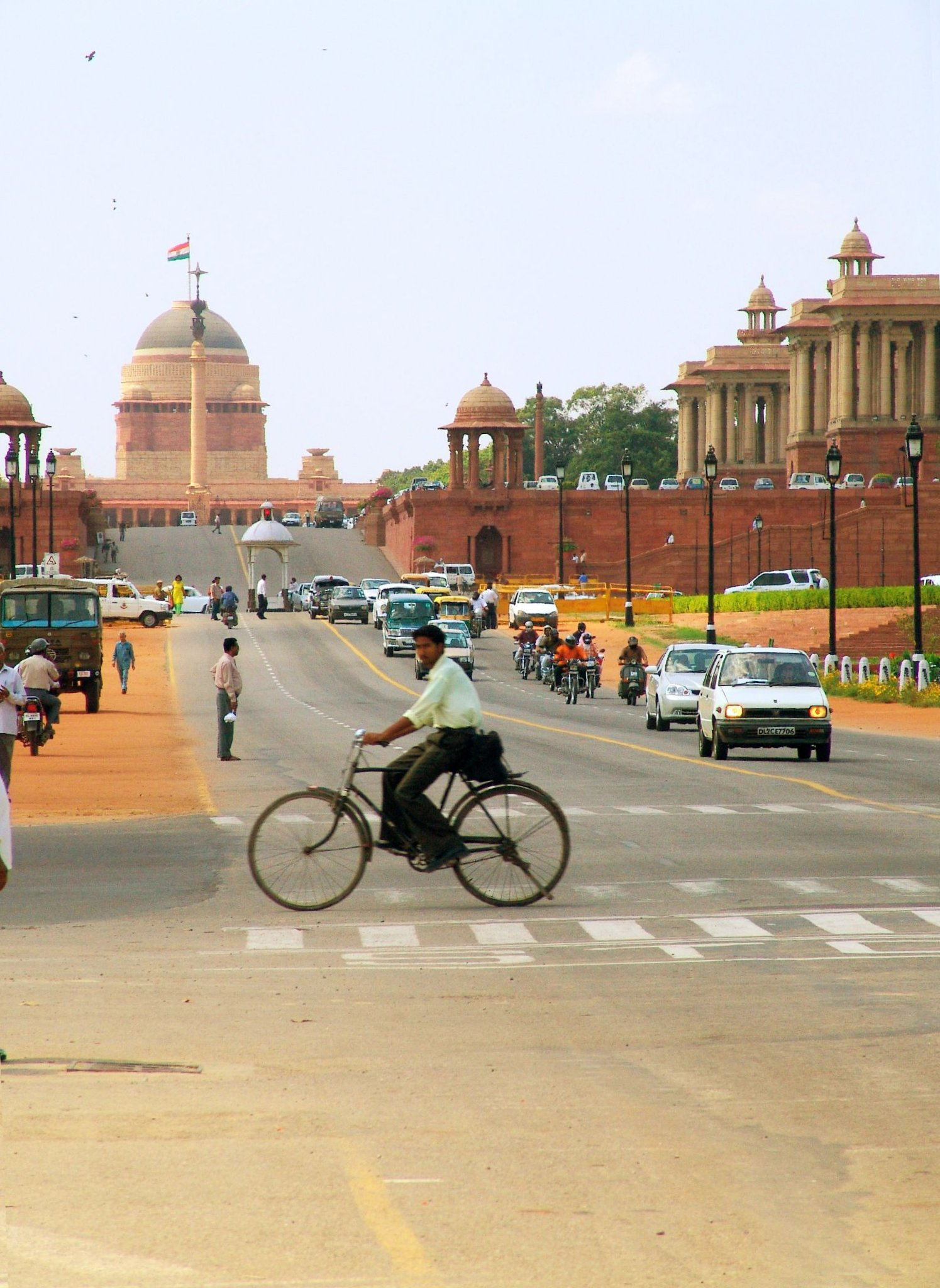 Rajpath